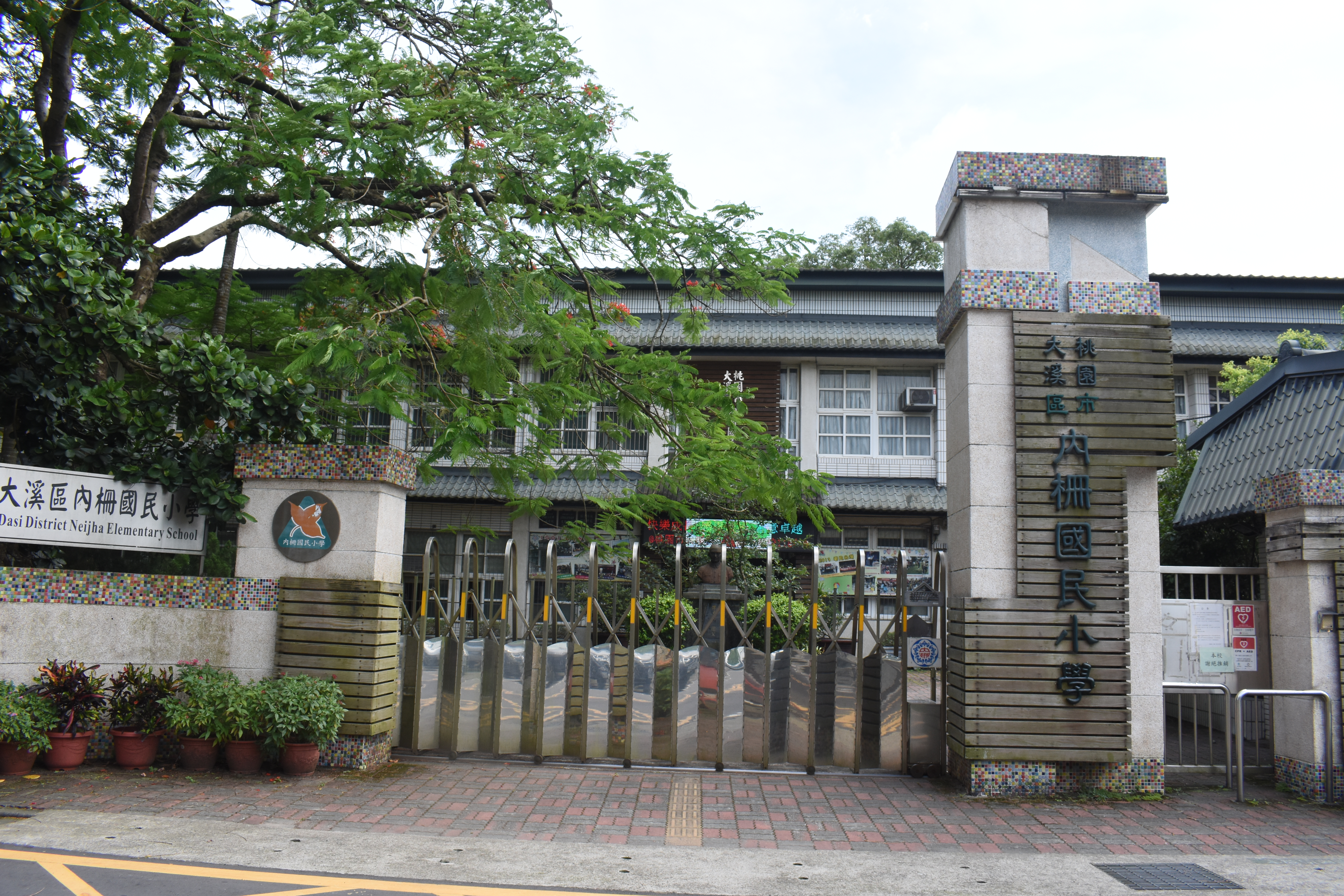 內柵國民小學大溪區安和路38號校門